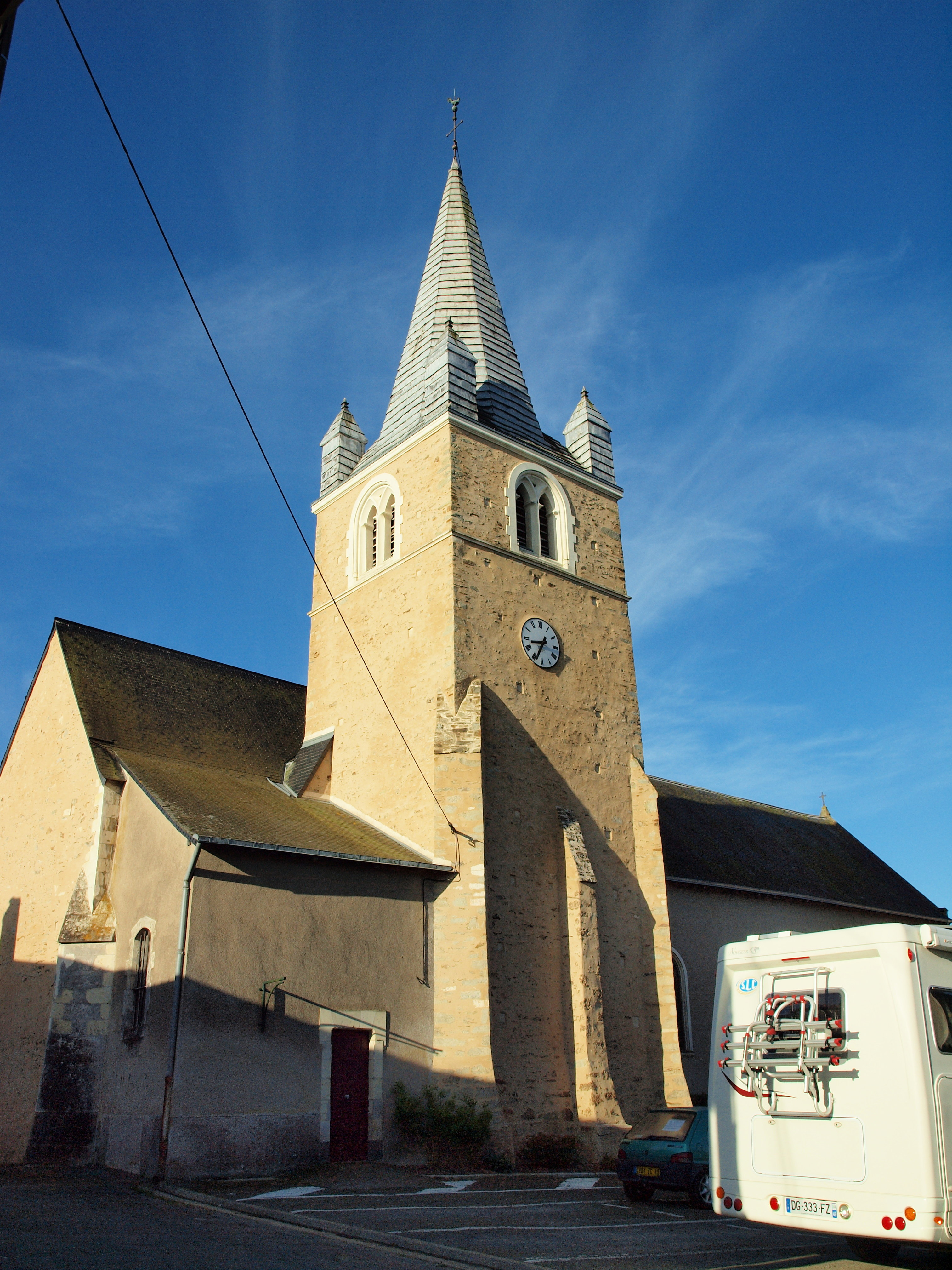 Laigné (Mayenne, France)